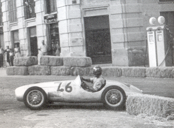 Bandini 750 corsa siluro / Ilario Bandini a Chieti